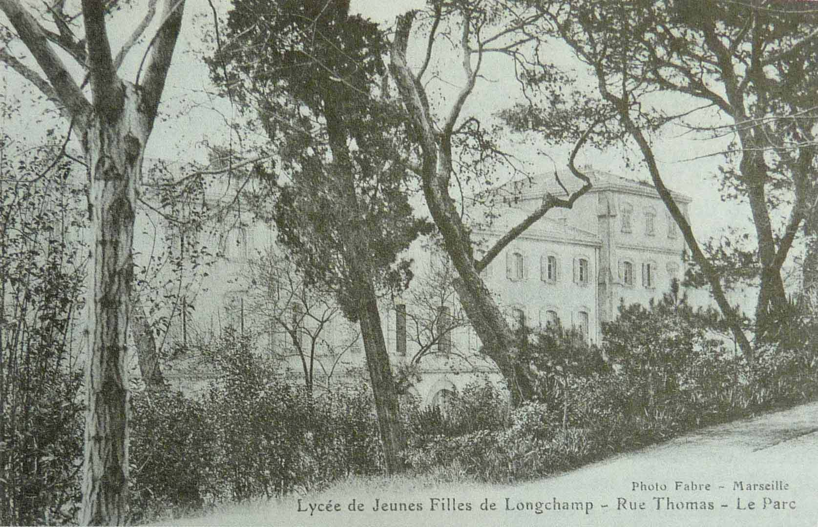 Vue panoramique N&B du collège Longchamp, à l'époque où il s'agissait d'un Lycée de jeunes filles.